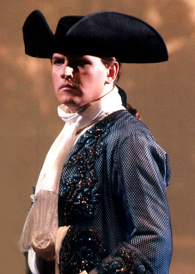 Blagoj Nacoski